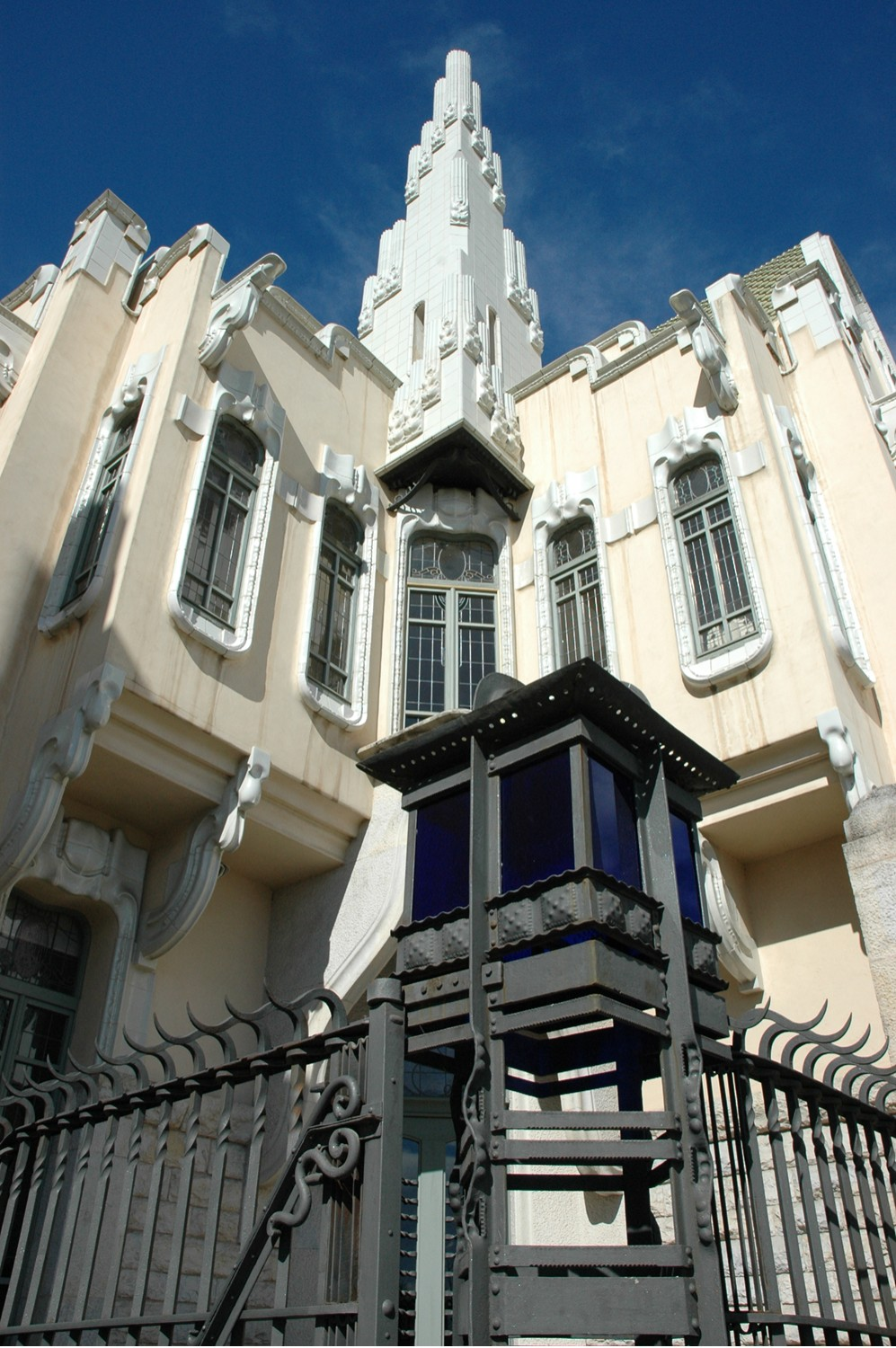 Farinera Teixidor, amb detall de fanal